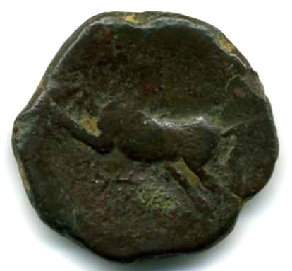 Massinissa, monnaie (revers), Algérie